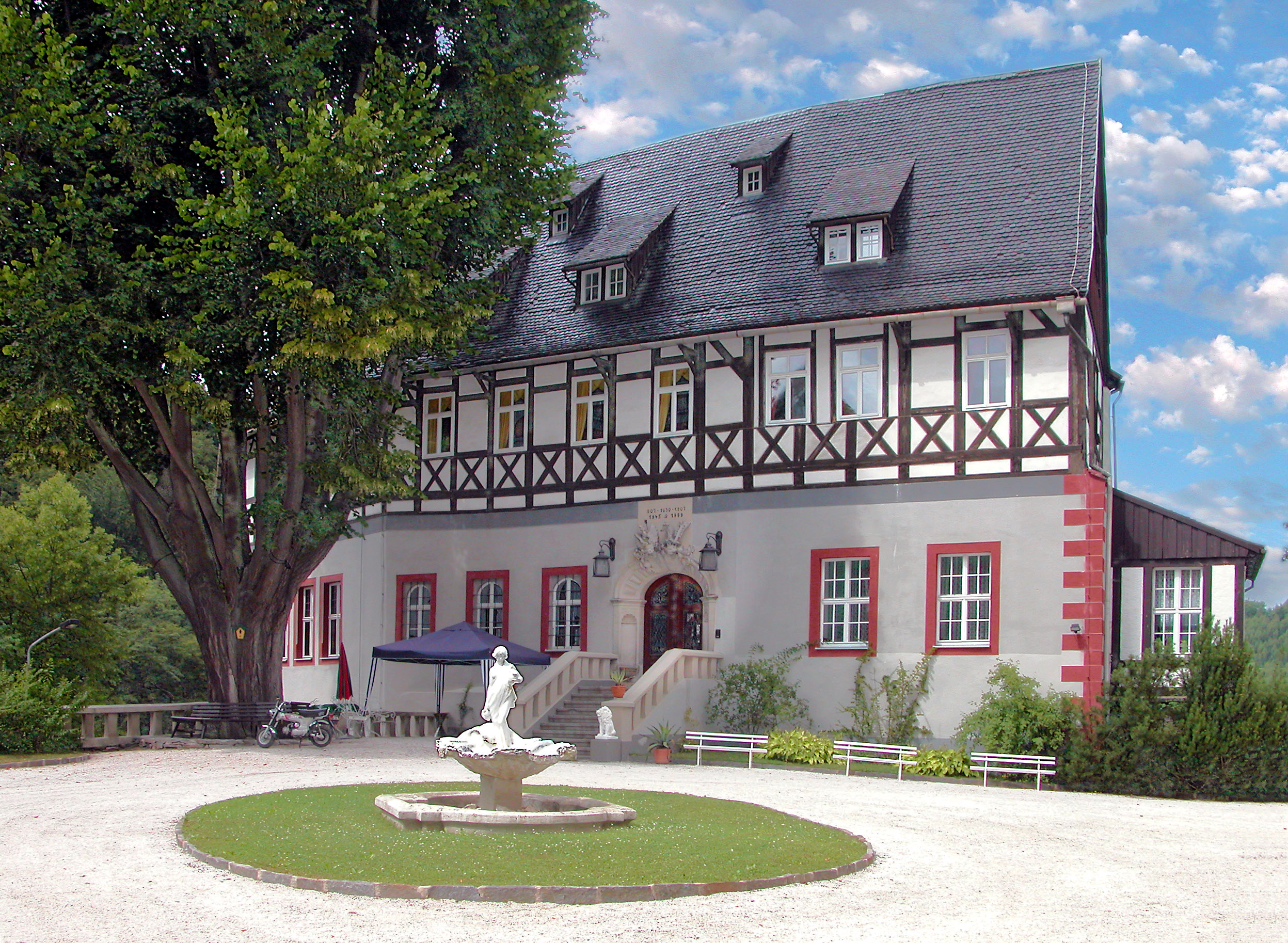 03.08.2006 09514 Rauenstein (Pockau-Lengefeld), Rauenstein 4 (GMP: 50.728442,13.201055): Schloß Rauenstein. Mittelalterliche Burg (13./14. Jh.), um 1630 Umbauten und Erweiterungen. In der DDR Kindererholungsheim. 1999 von Carl-Wilhelm von Herder reprivatisiert. Nicht öffentlich zugänglich. Sicht von Südosten mit Ehrenhof und dem Brunnen aus Sanssouci. [DSCN10887.TIF]20060803410DR.JPG(c)Blobelt